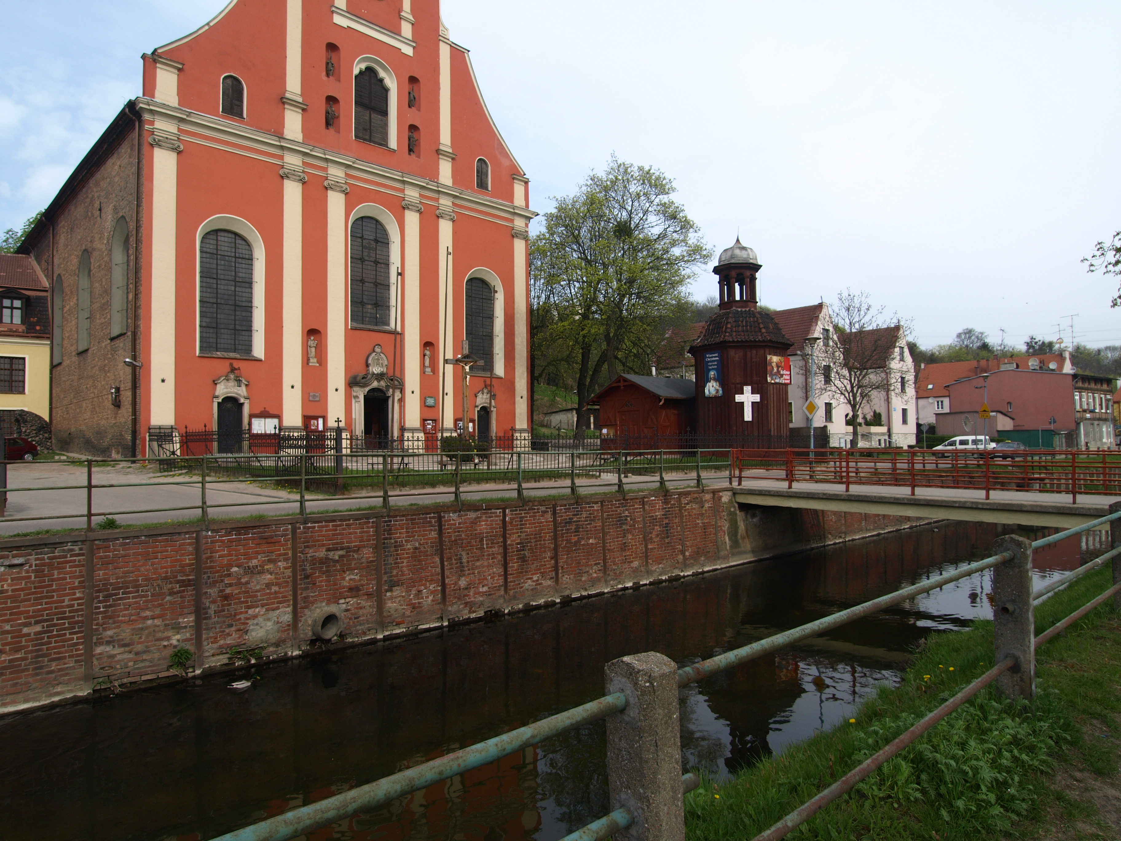 Zabytkowy Kanał Raduni i zabytkowy kościół św. Ignacego Loyoli w Gdańsku-Oruni (Stare Szkoty).